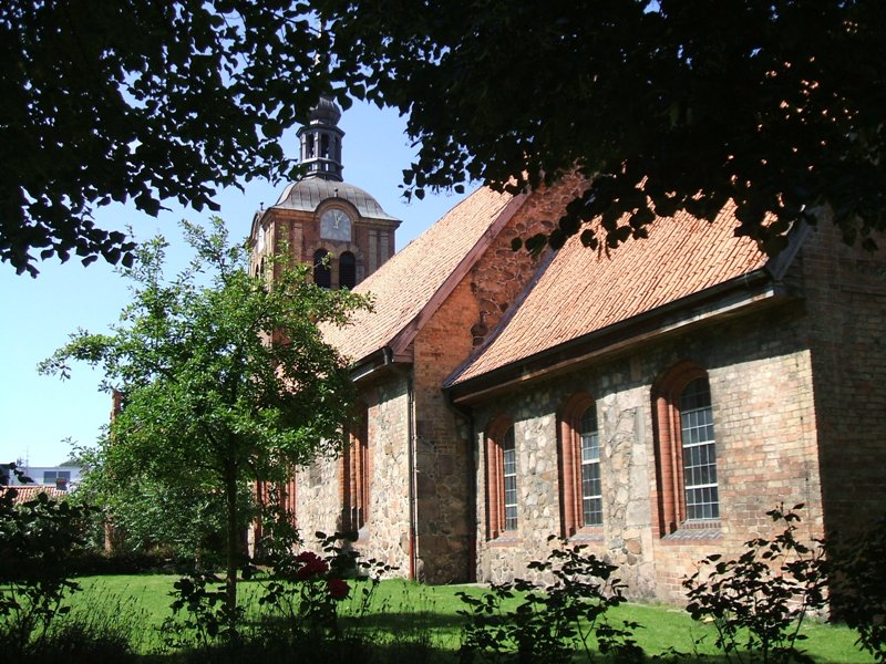 Sankt Hans Kirke i Flensborg